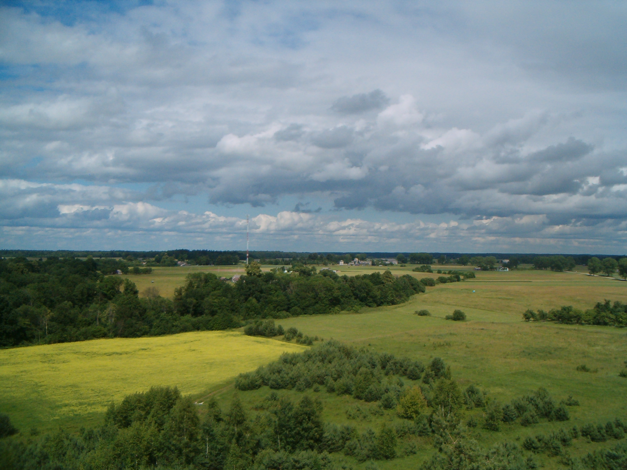 Čiobiškio sen., Lithuania